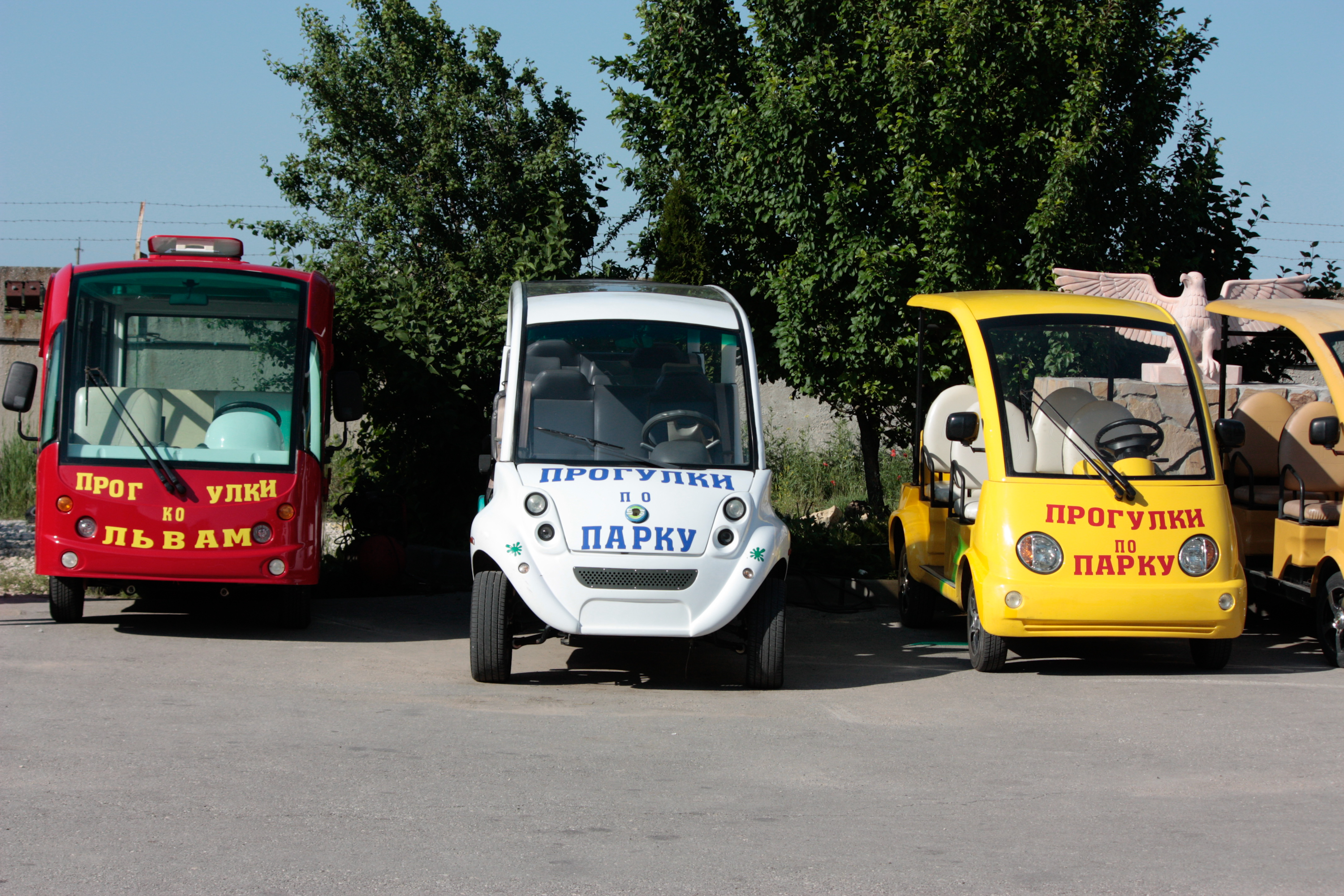 Сафари-парк «Тайган»: ул. Лавандова, 1, г. Белогорск, Белогорский район, Крым This object is located on the Crimean Peninsula and recognized as a protected area by both Russia and Ukraine under the ID: 8210074 / 01-207-5012, respectively. The legal status of the Crimean region is currently disputed.